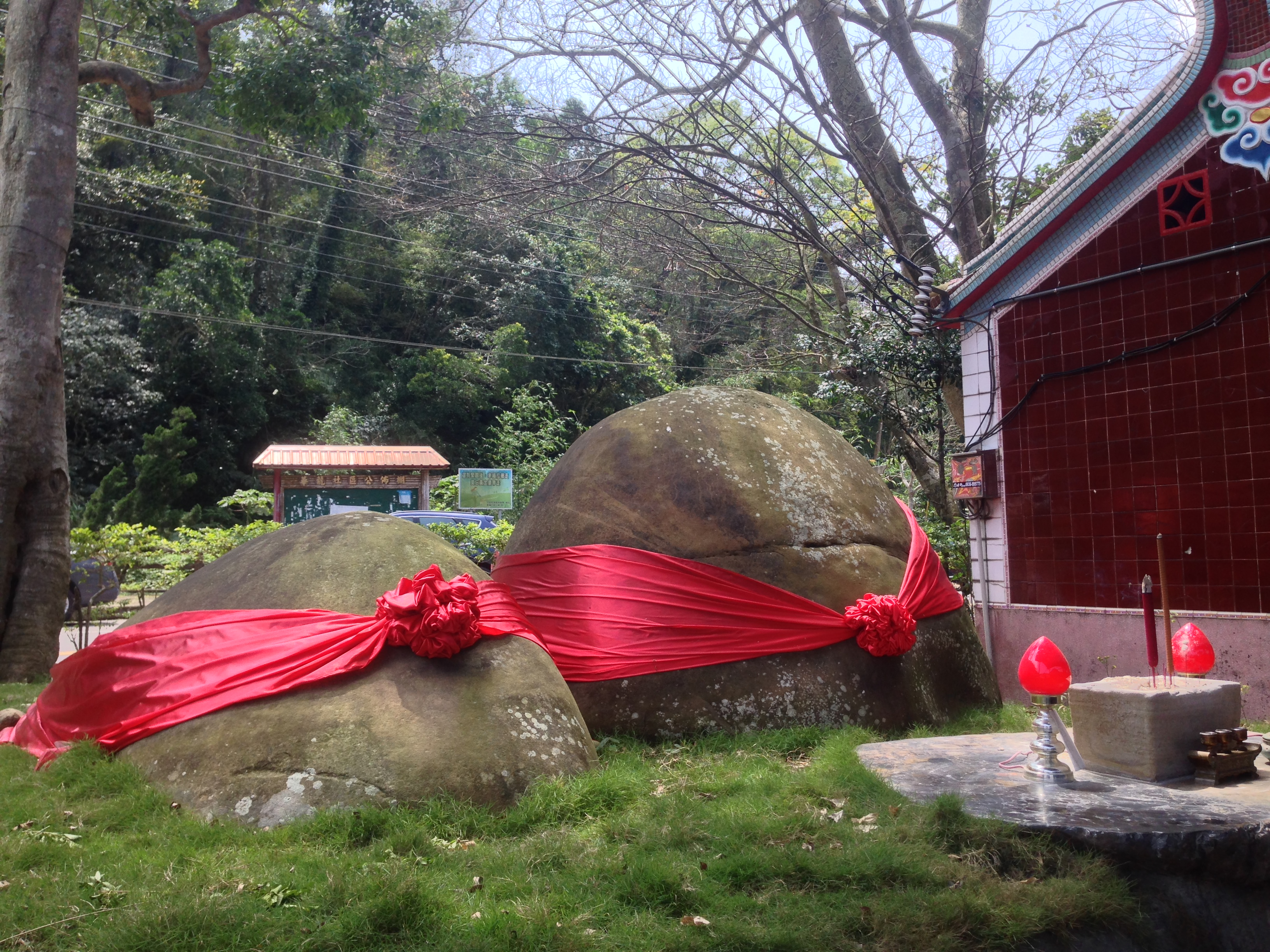 鹿寮坑石爺石娘正面